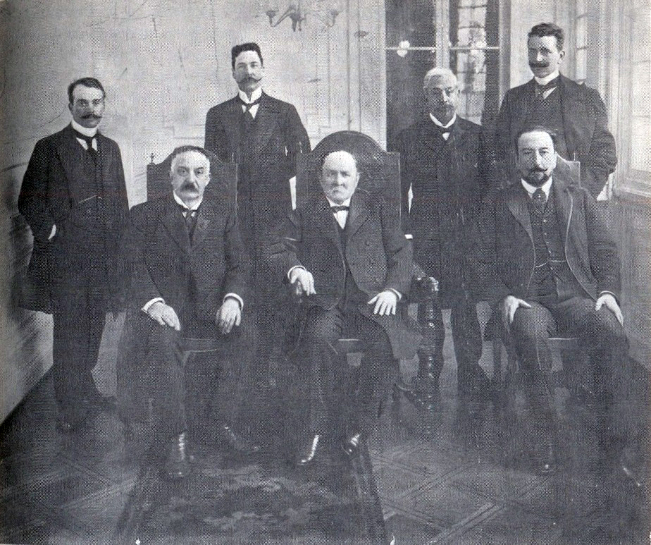 Tercer gabiente de Ramon Barros Luco